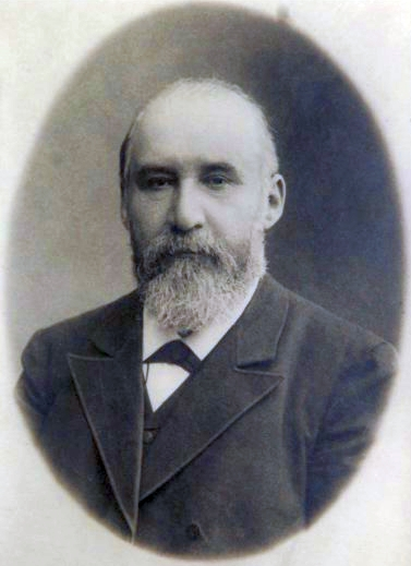 Стороженко, Николай Ильич